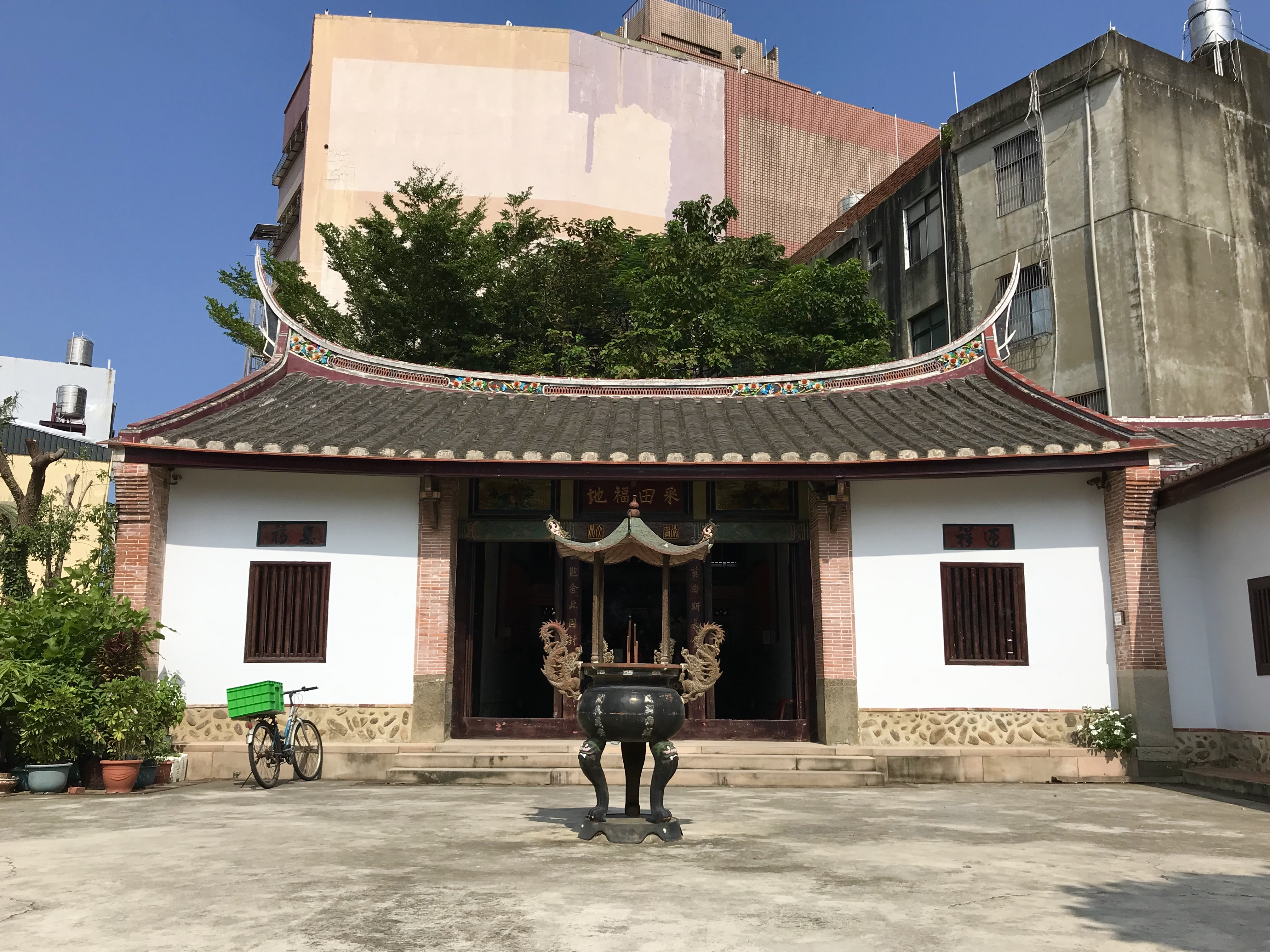 竹北采田福地正面照